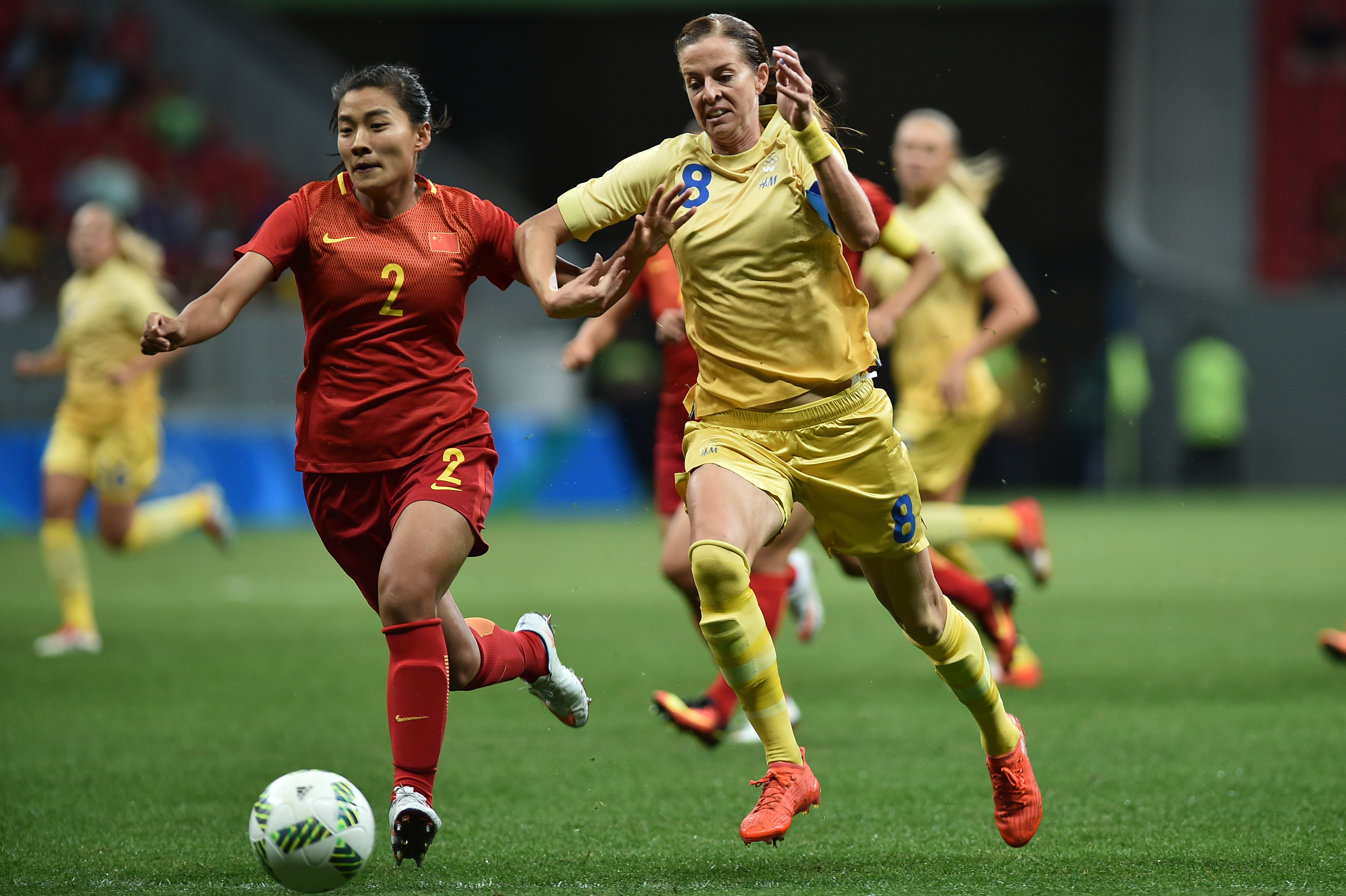 Estádio Nacional de Brasília Mané Garrincha, Brasília, DF, Brasil, 9/8/2016 Foto: Andre Borges/Agência Brasília China e Suécia jogam nesta terça-feira (9), no Estádio Mané Garrincha, pelo grupo E do futebol feminino nas Olimpíadas 2016.